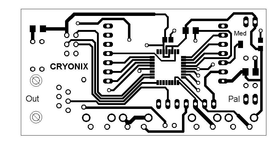 Plošný spoj - návrh plošného spoje